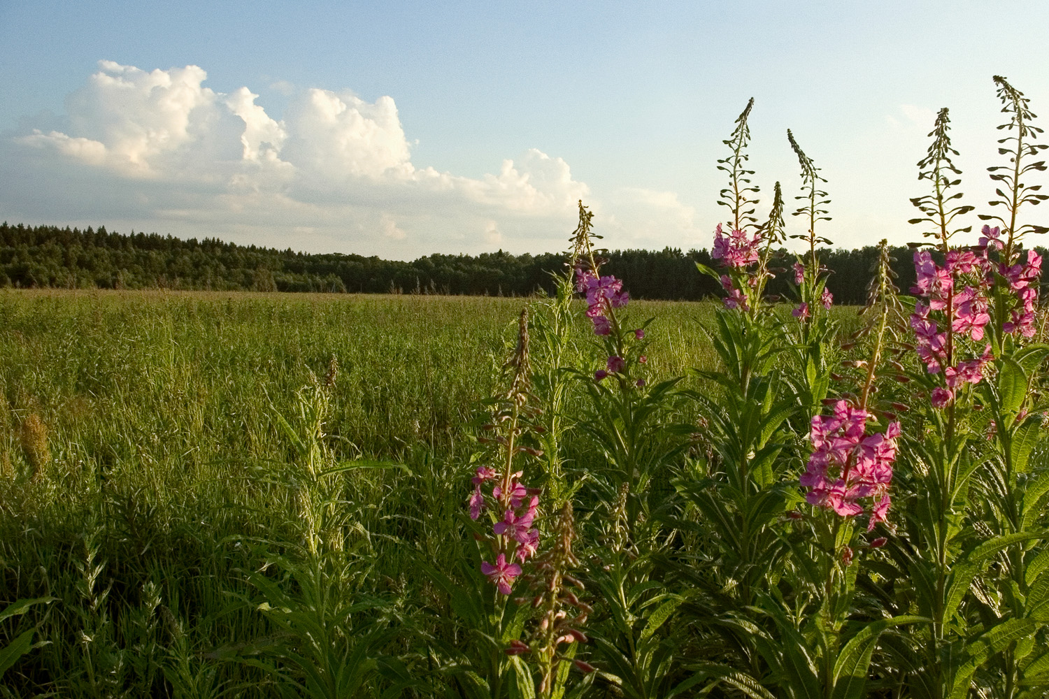 Подмосковный пейзаж